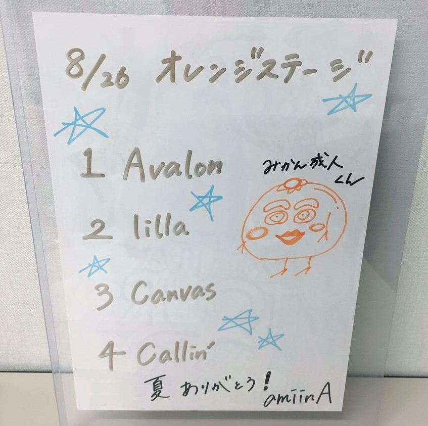 amiinAセトリボード(20170826(2))